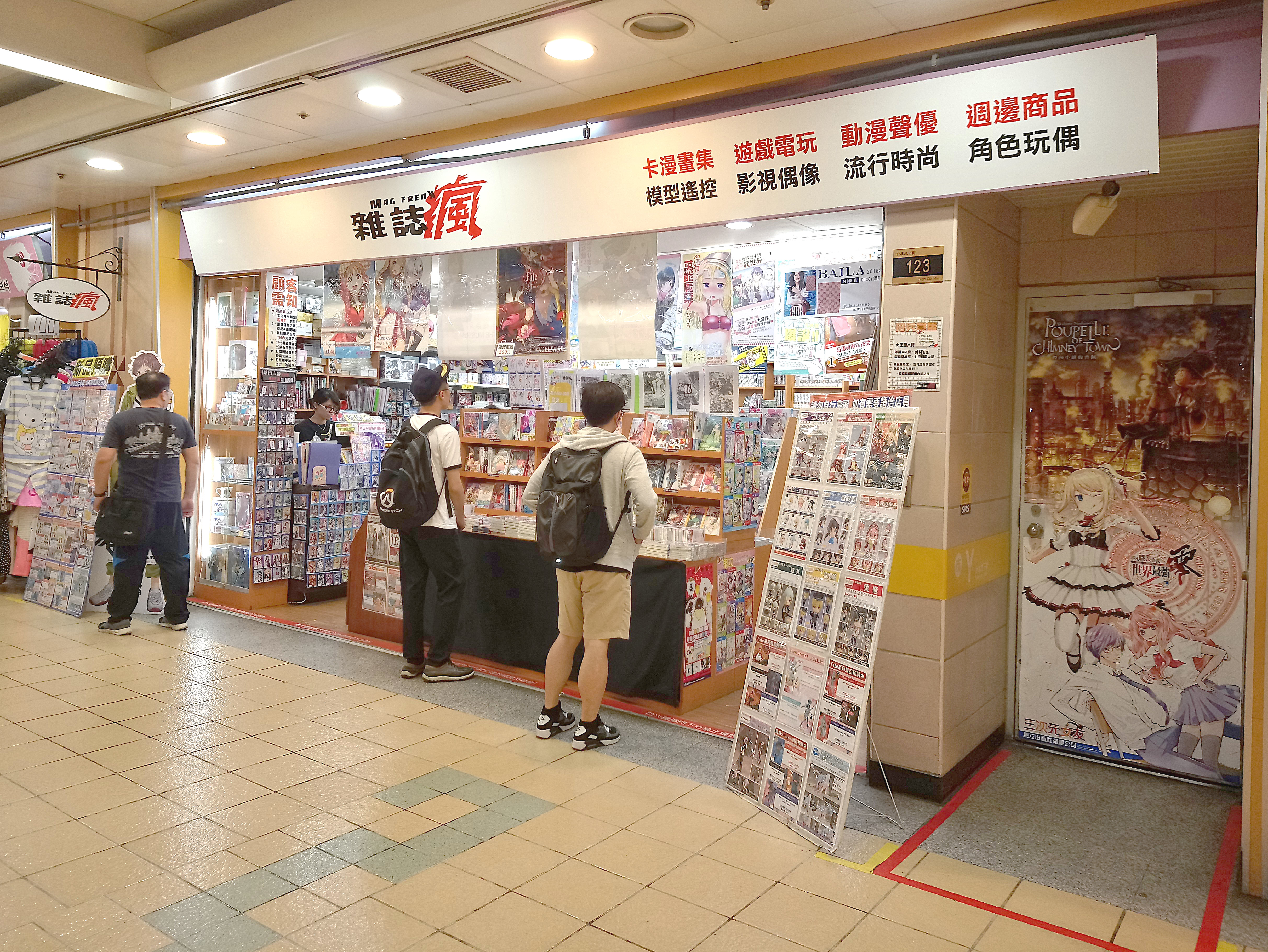 雜誌瘋北街店，位於台北地下街123號店。